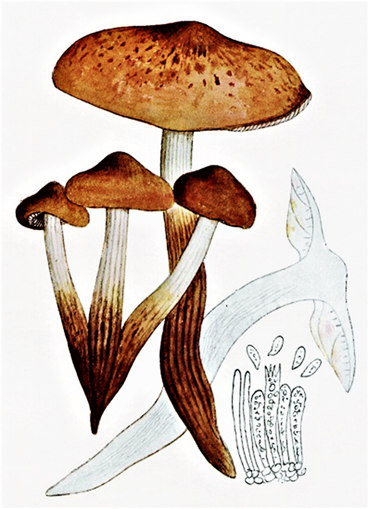 Giacomo Bresadola: Bild 1: Collybia fusipes (Bull.), 1789) Quél. (1872), heute Gymnopus fusipes (Bull.) Gray (1821)